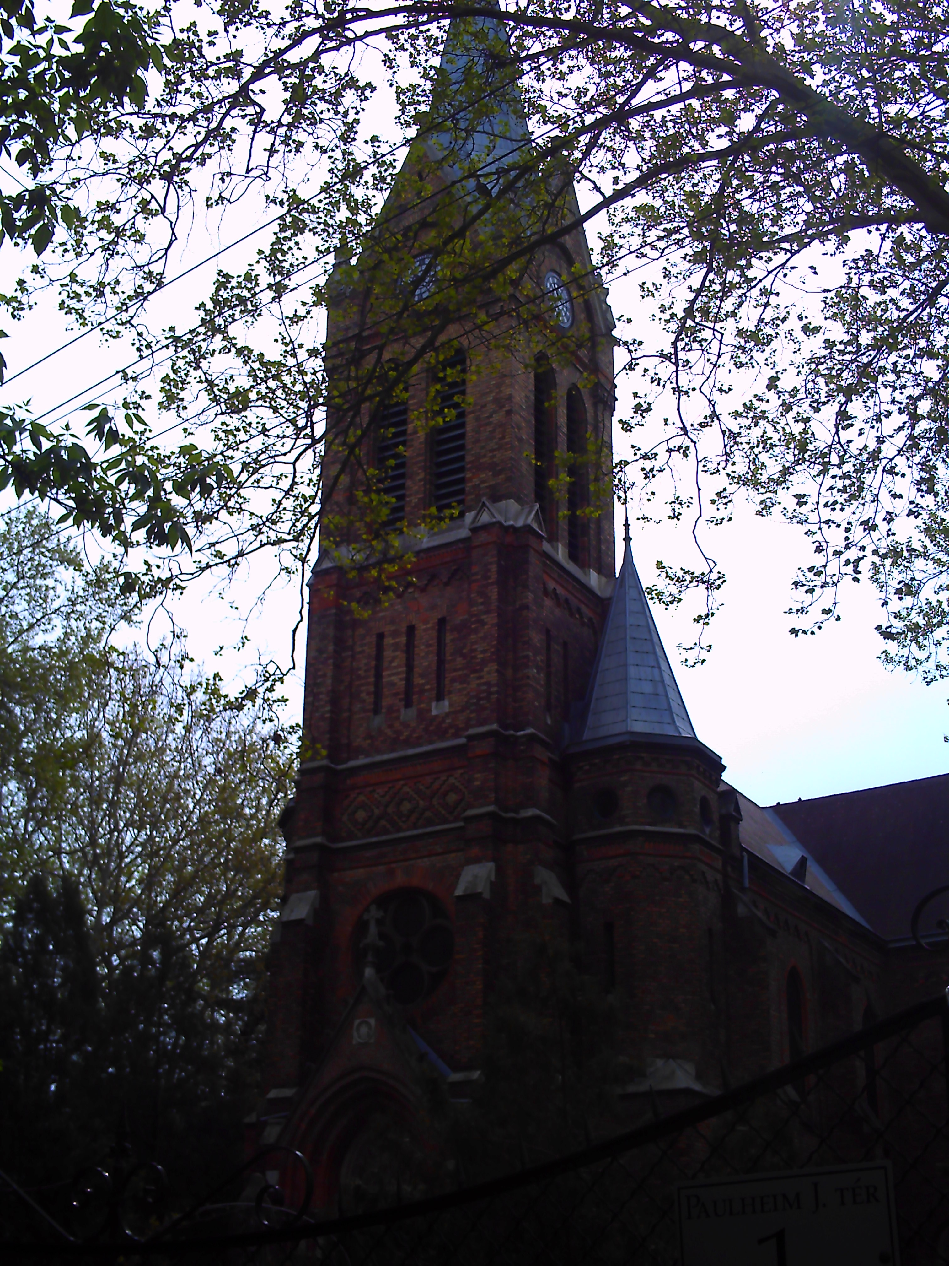 Templom, Budapest XVI. kerületében, Mátyásföldön, Paulheim J. tér 1.